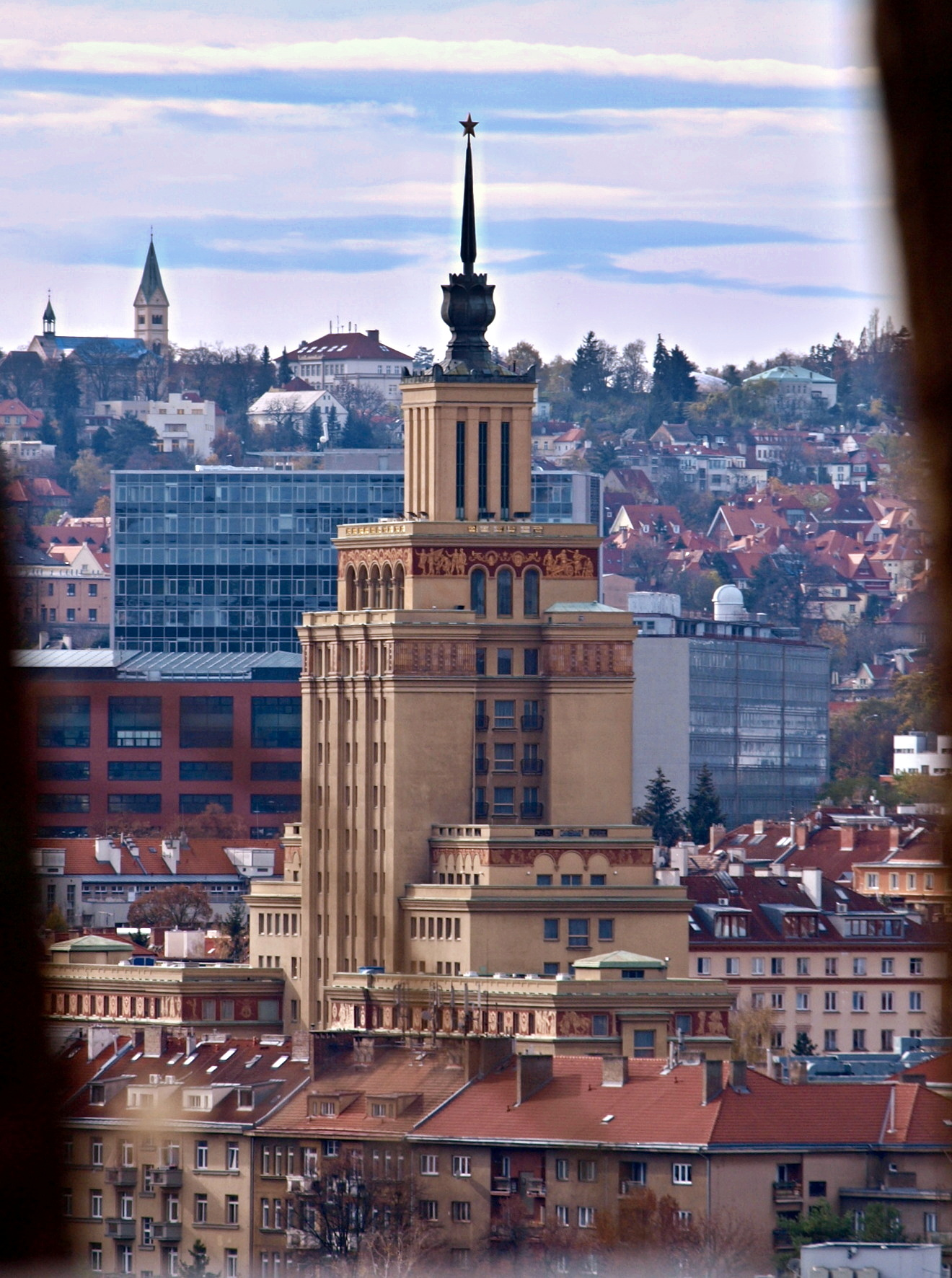 Praha-Dejvice, Hotel Internacionál